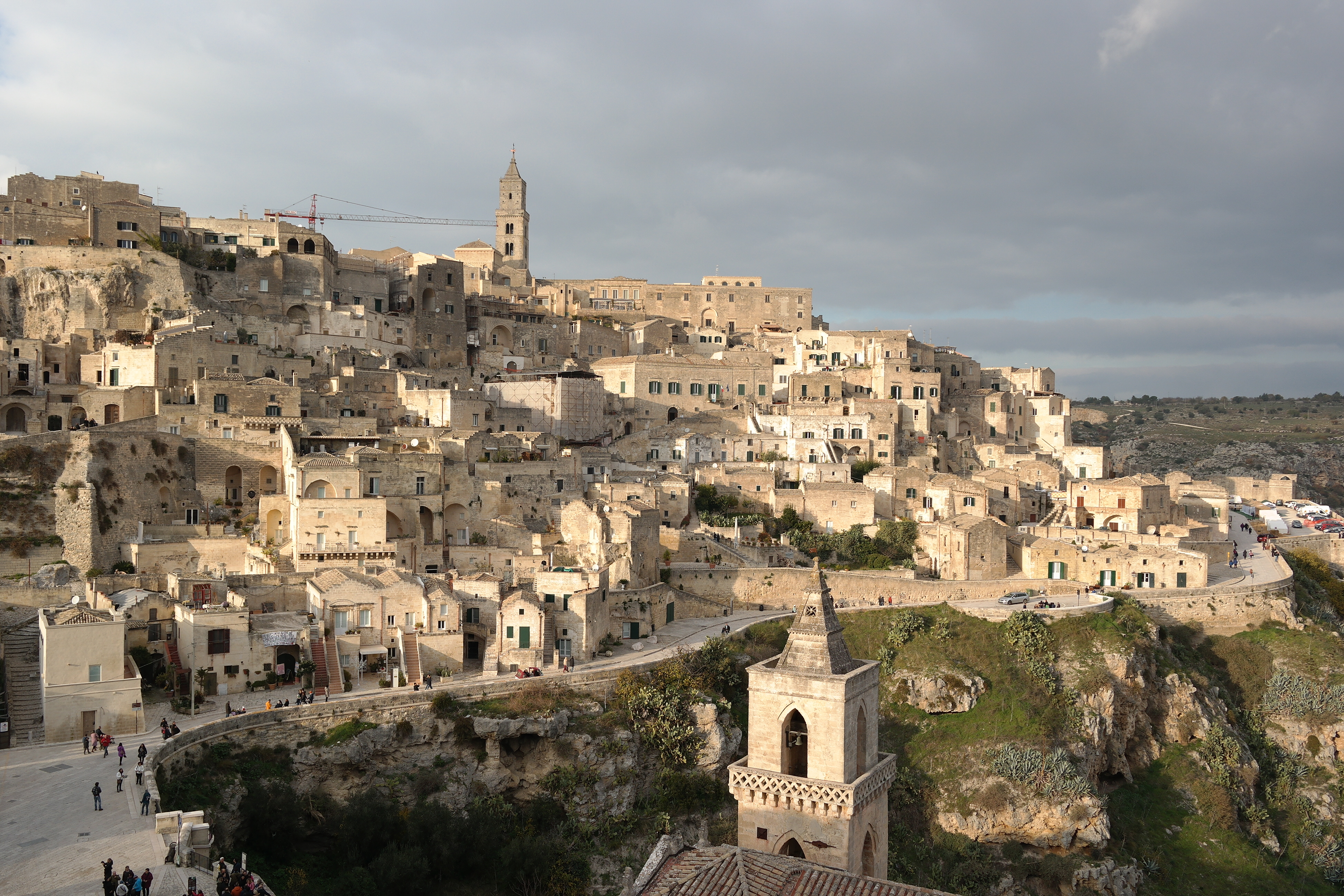 veduta della Civita a Matera